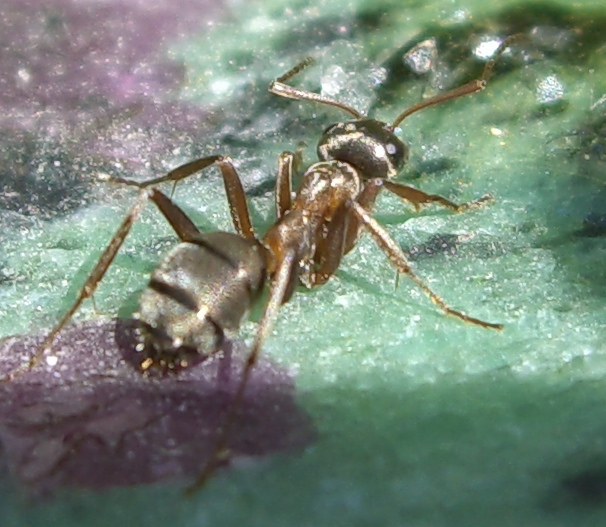 Formica sanguinea